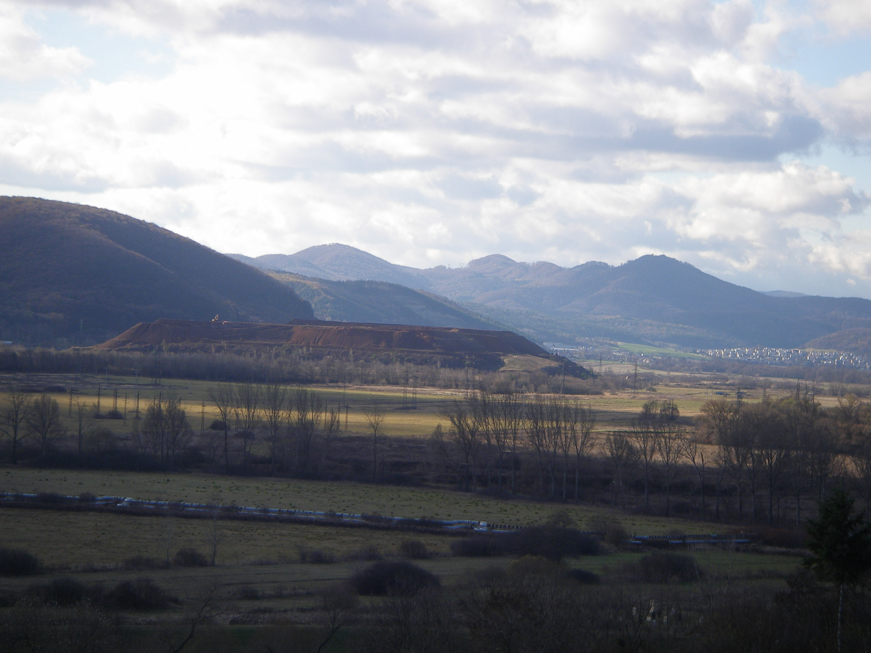 Halda odpadu v Žiari nad Hronom